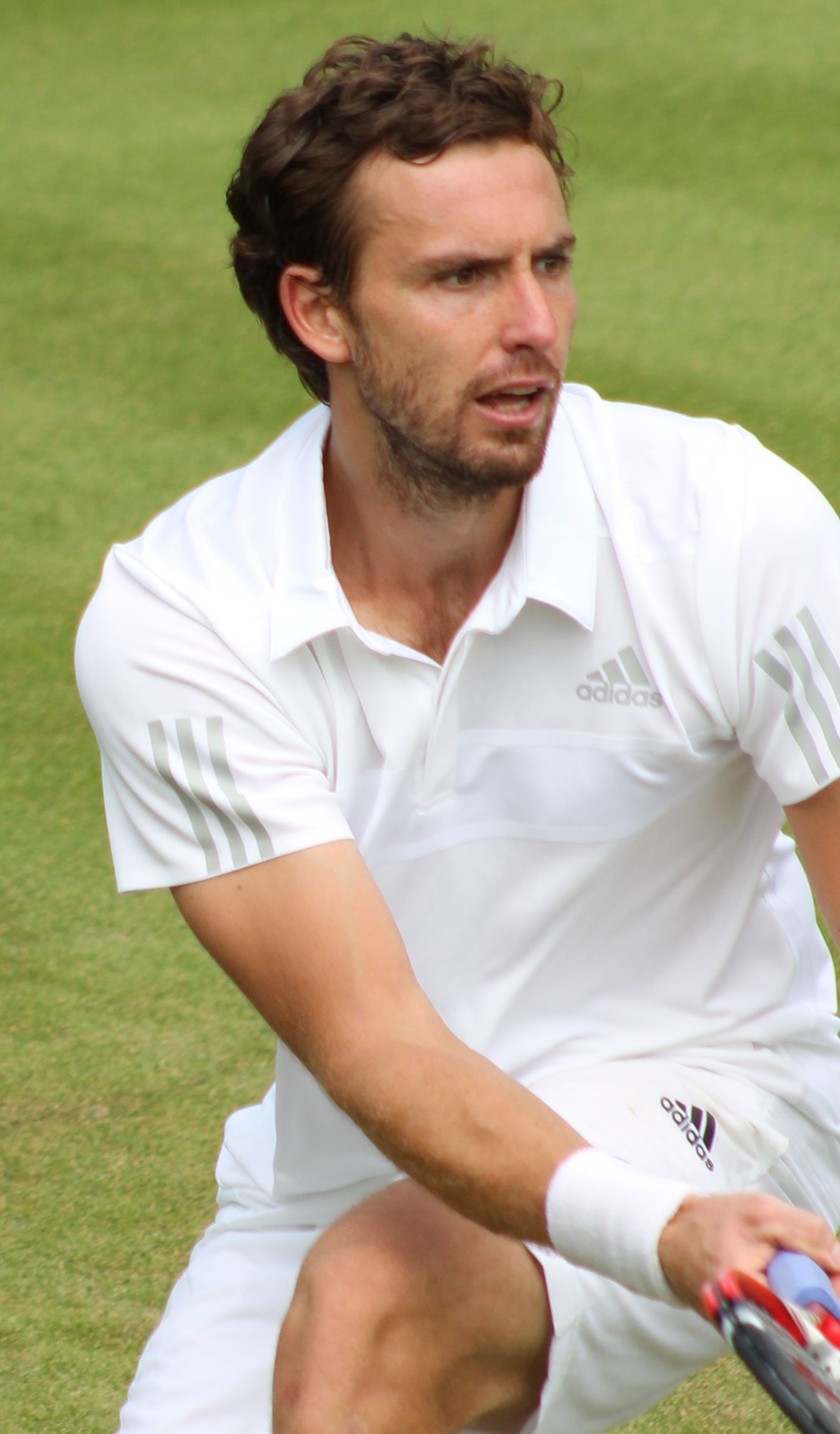 Gulbis WM14 (10)